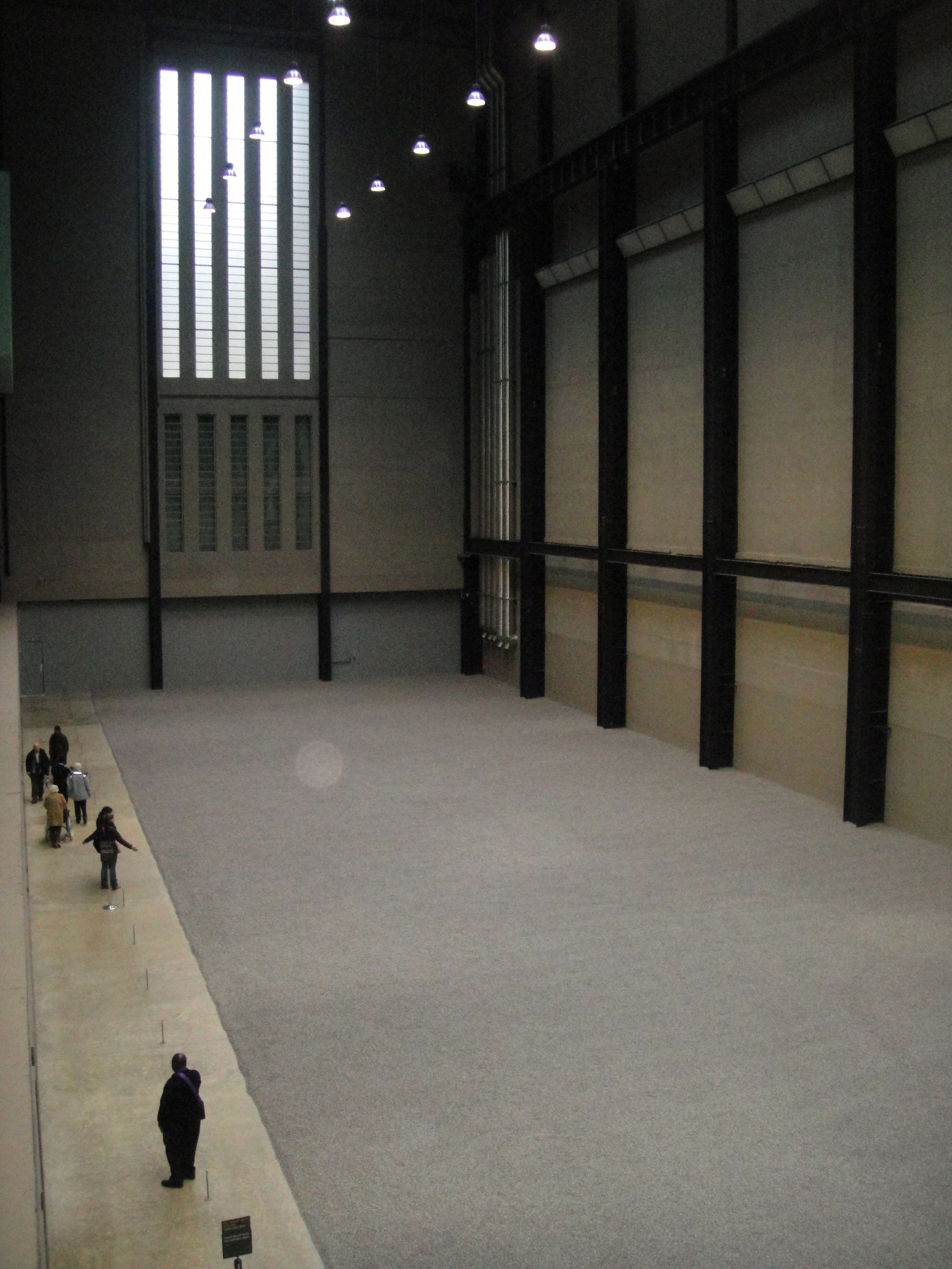 'Sunflower Seeds' by Ai Weiwei, Tate Modern Turbine Hall.